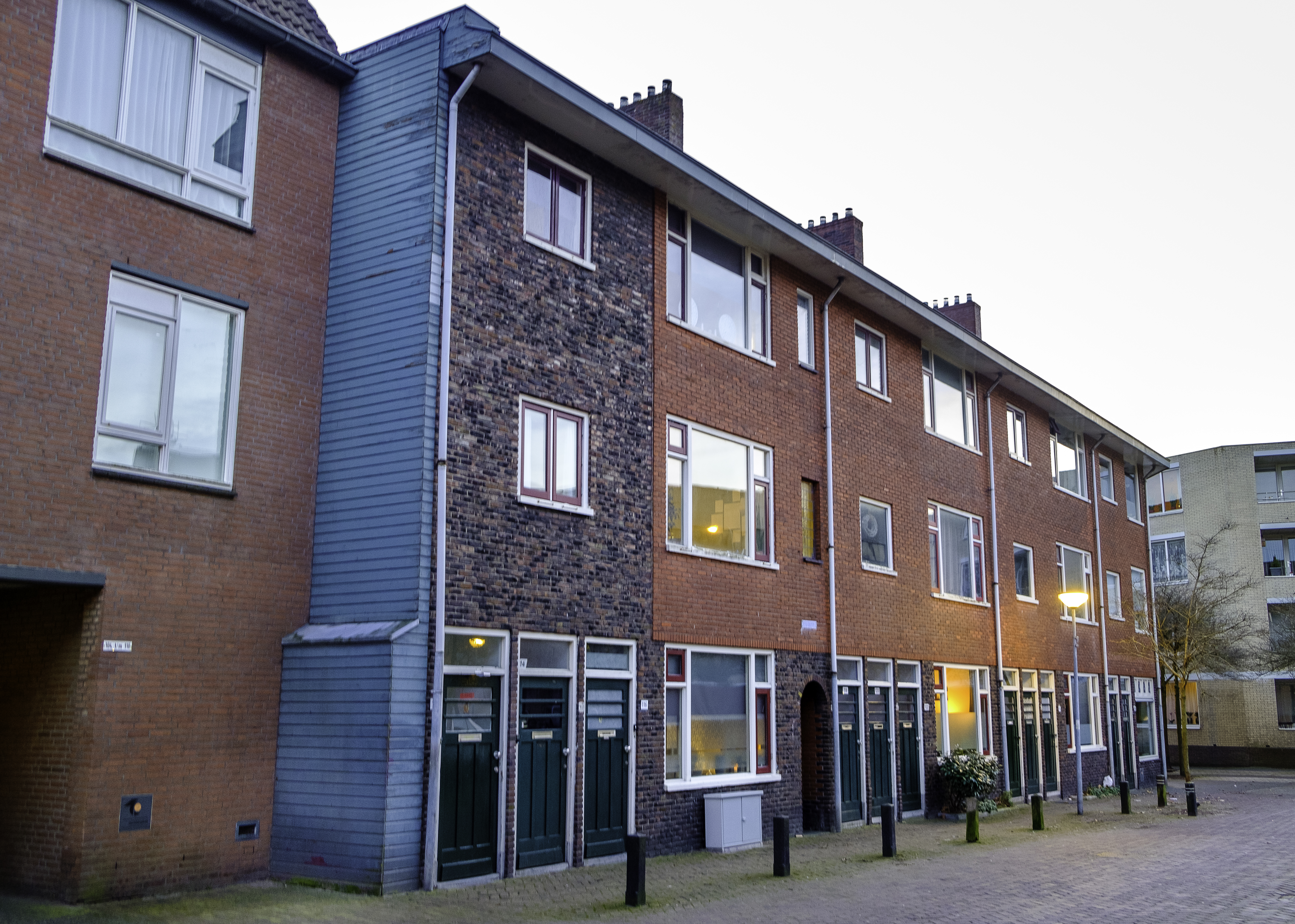 Gebouw dat niet werd gesloopt in de Davidstraat in de jaren 1970